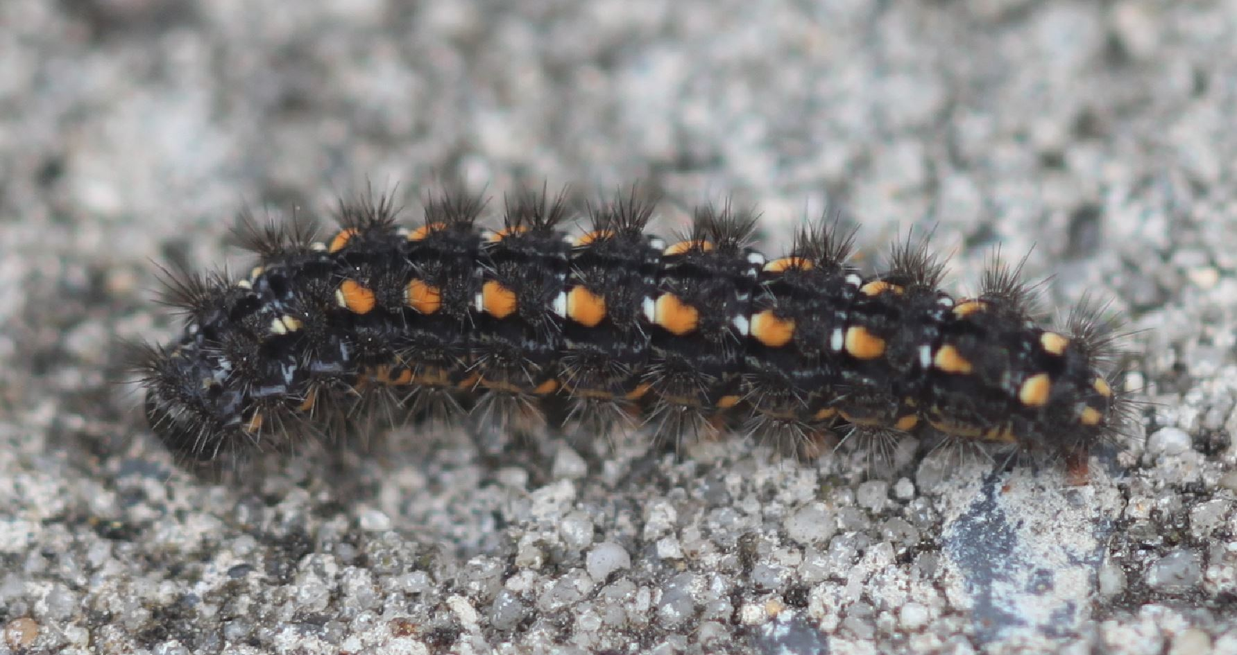 Raupe des Gelbleib-Flechtenbärchens (Eilema complana) am 10. April 2019 in der Schwetzinger Hardt